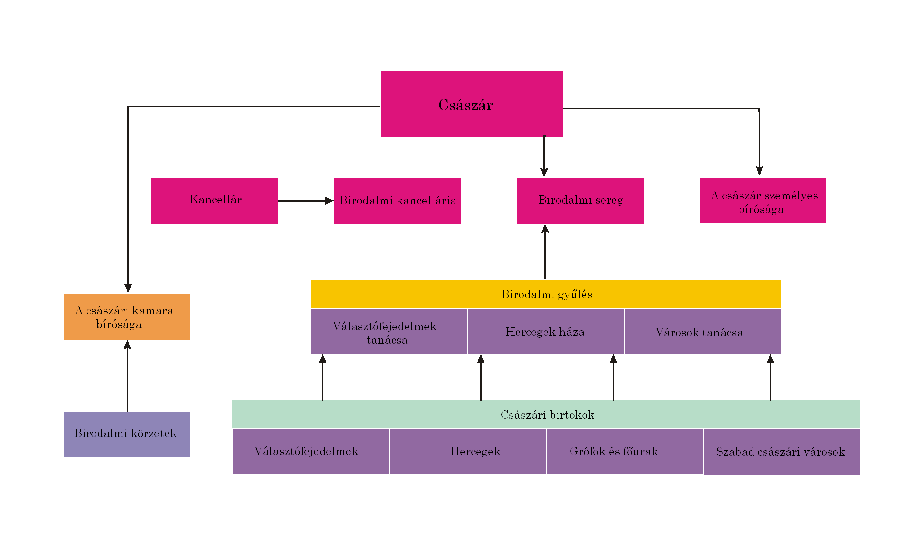 A Német-római Birodalom struktúrája